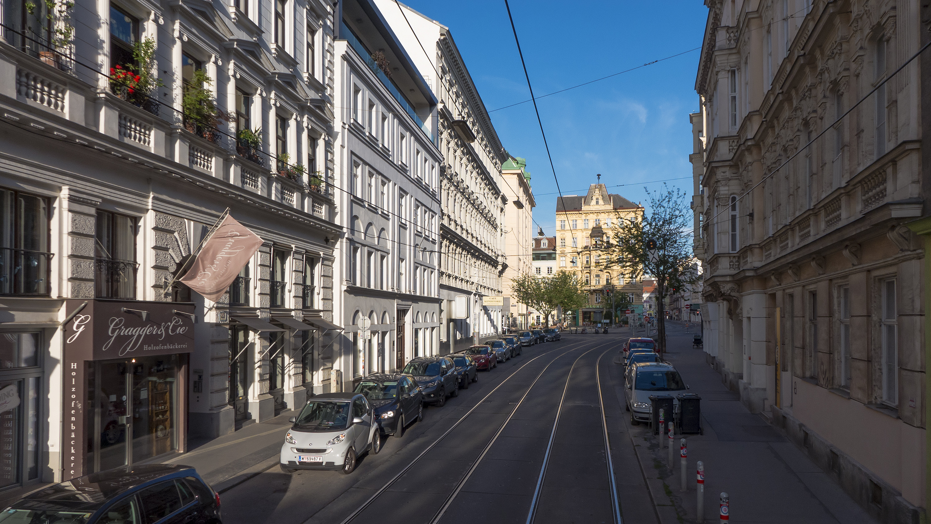 Siebensterngasse in Wien 7 bei Nr. 25 Richtung Westen